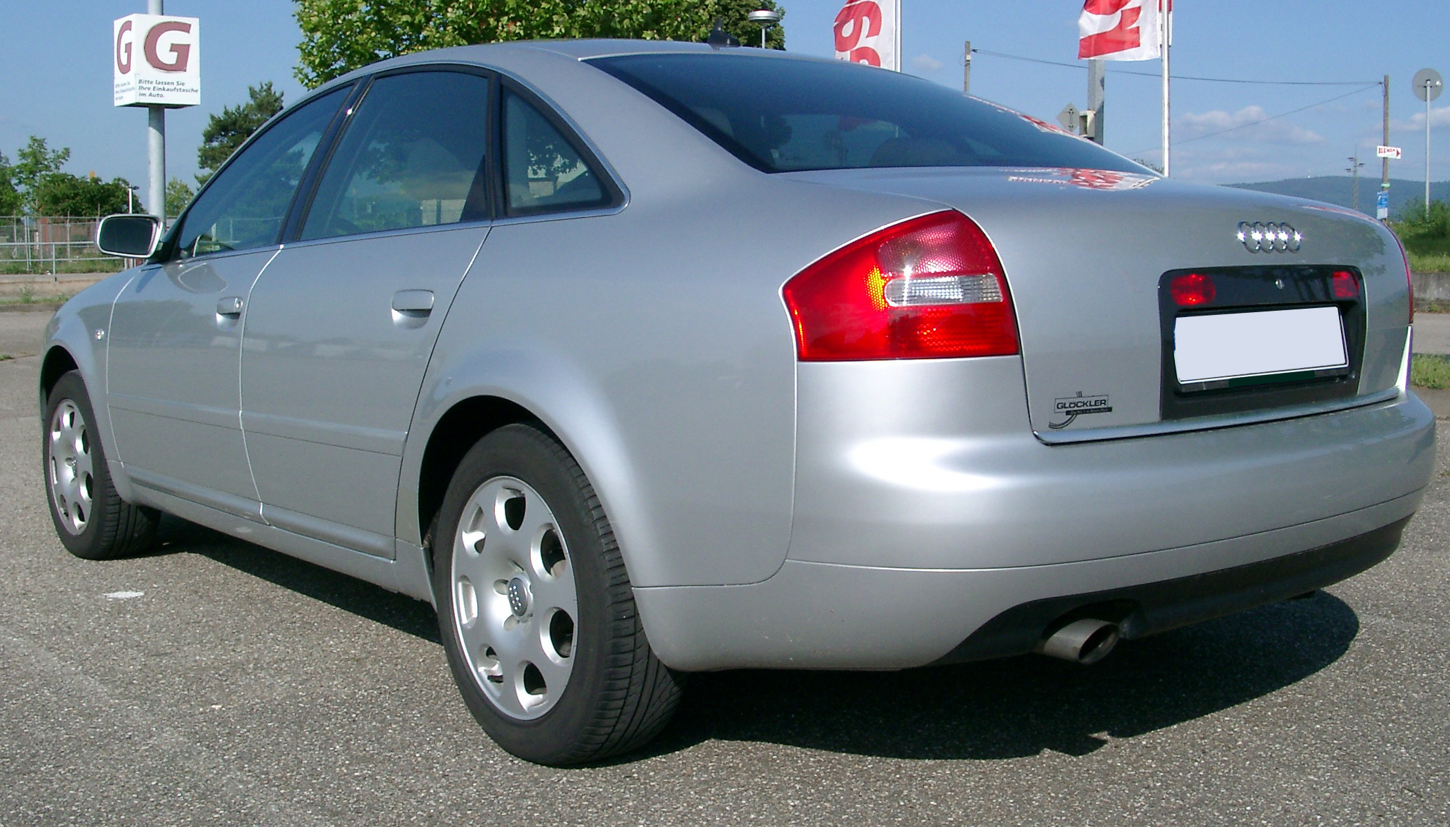 Audi A6 C5